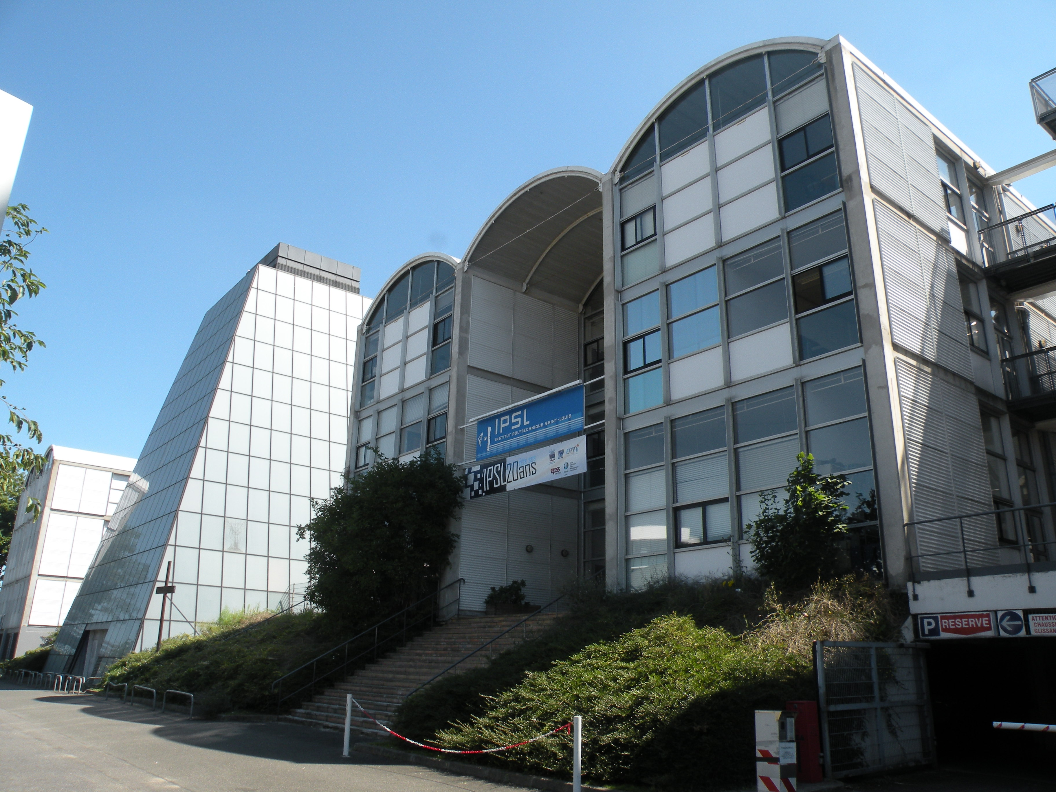 Institut polytechnique St Louis cergy